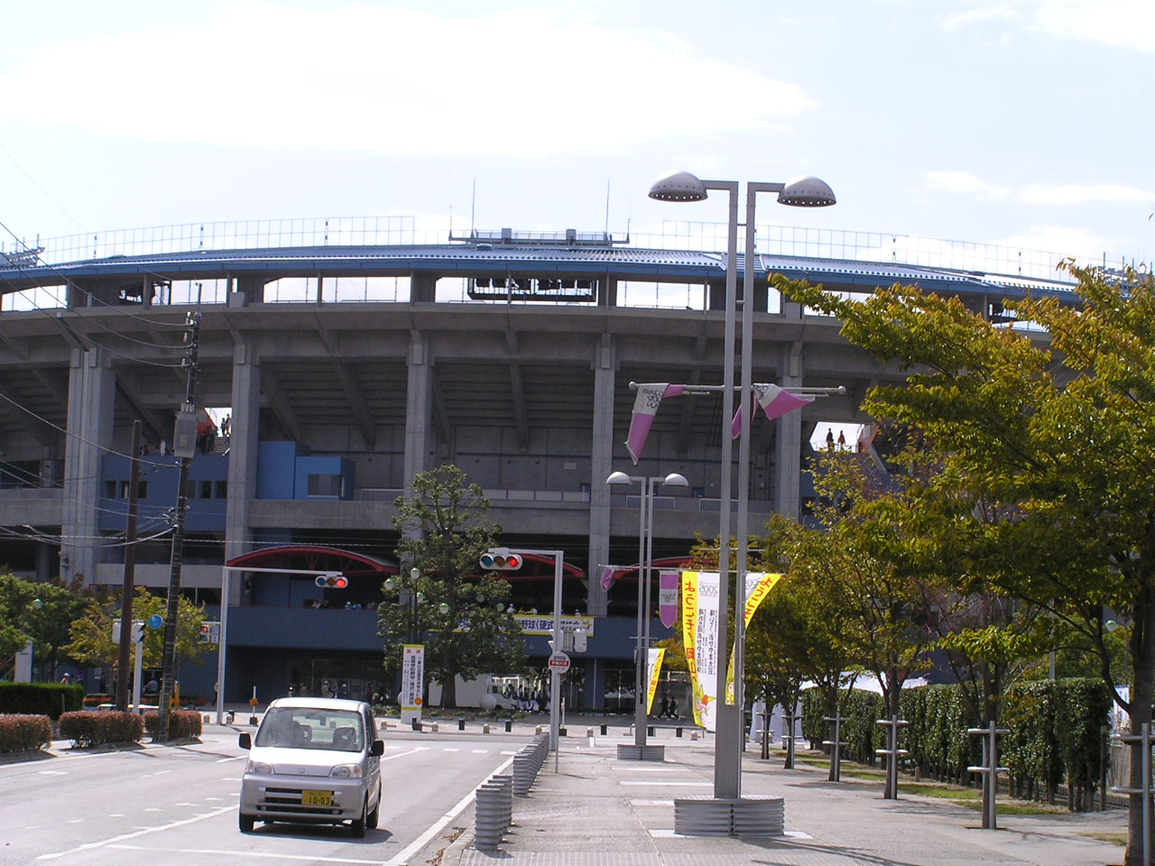 muscat stadium main gate